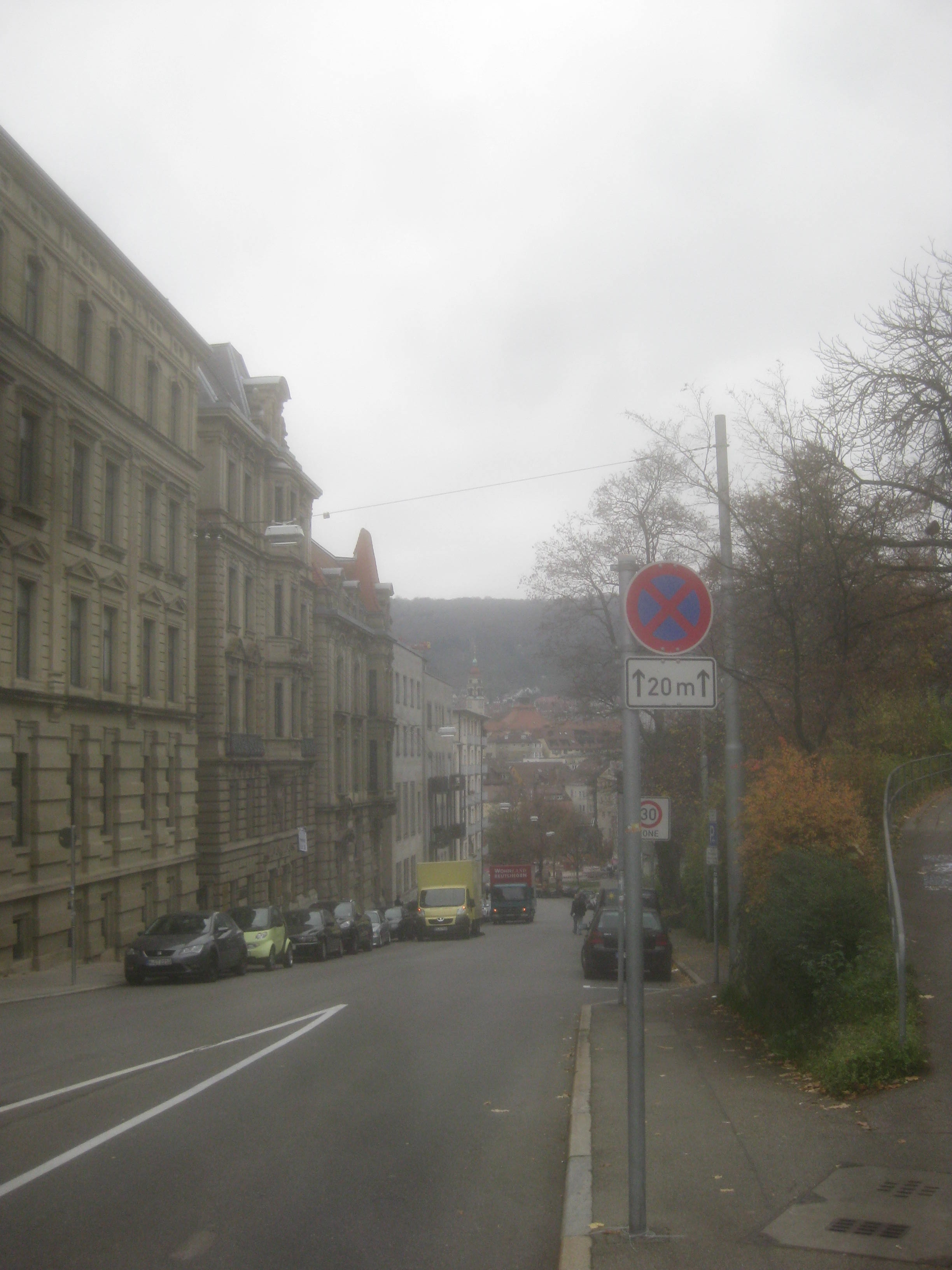 „Silberbuckel“, Steigung am Ende der Silberburgstraße in Stuttgart, zwischen Marienstraße und Tübinger Straße.